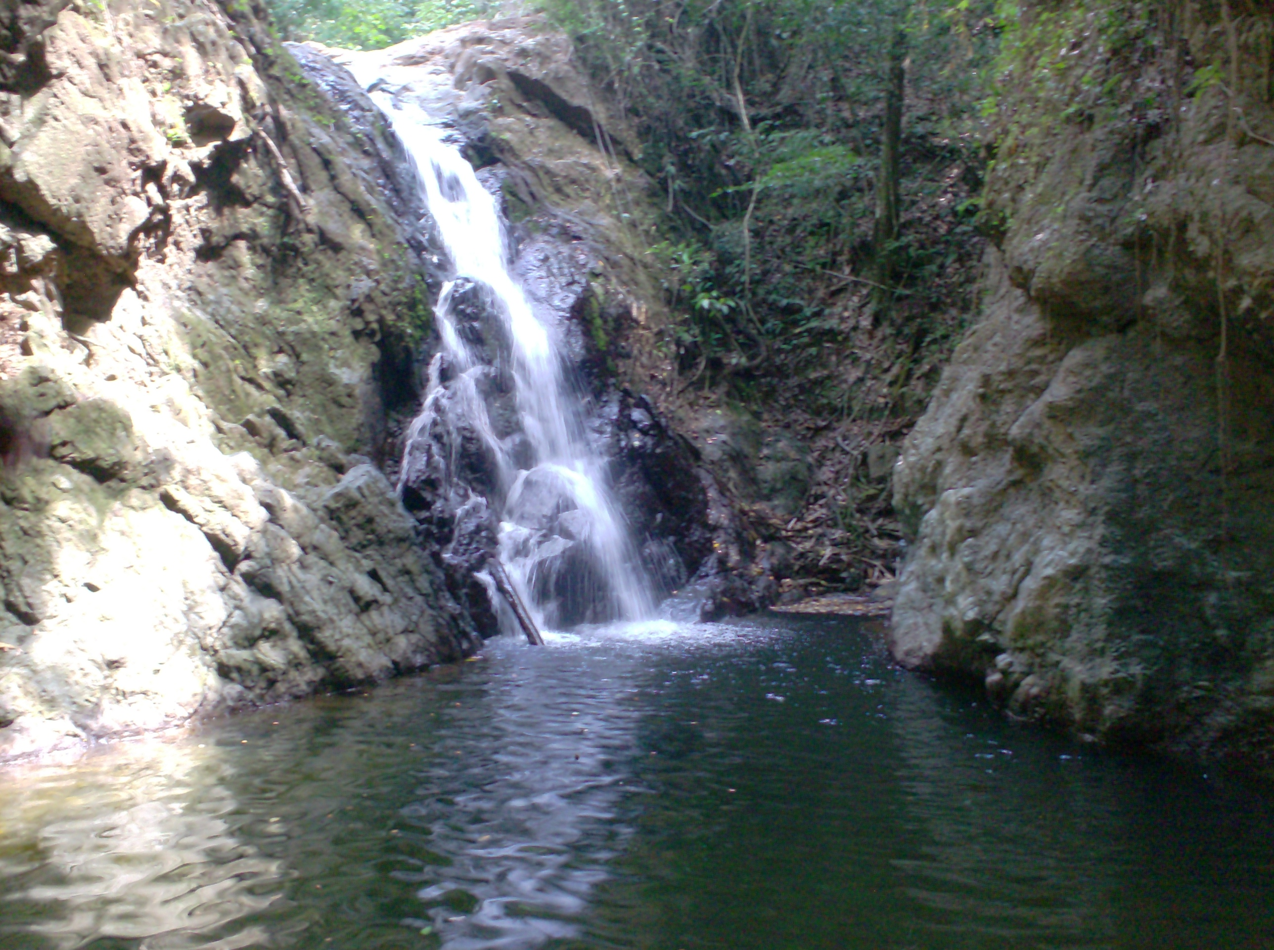 Fotografía del Charco de los Indios, en el río Grand Fond, Fondo Grande, Loma de Cabrera, República Dominicana.